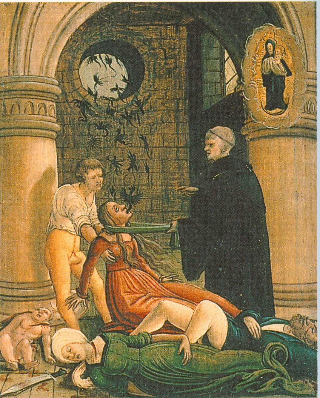 Exorzismus an einer Frau, die vorher ihr Kind und ihre Eltern getötet hat Großer Mariazeller Wunderaltar von 1519